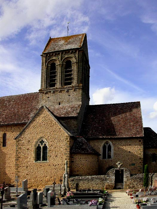 l'église et son petit cimetière attenant.